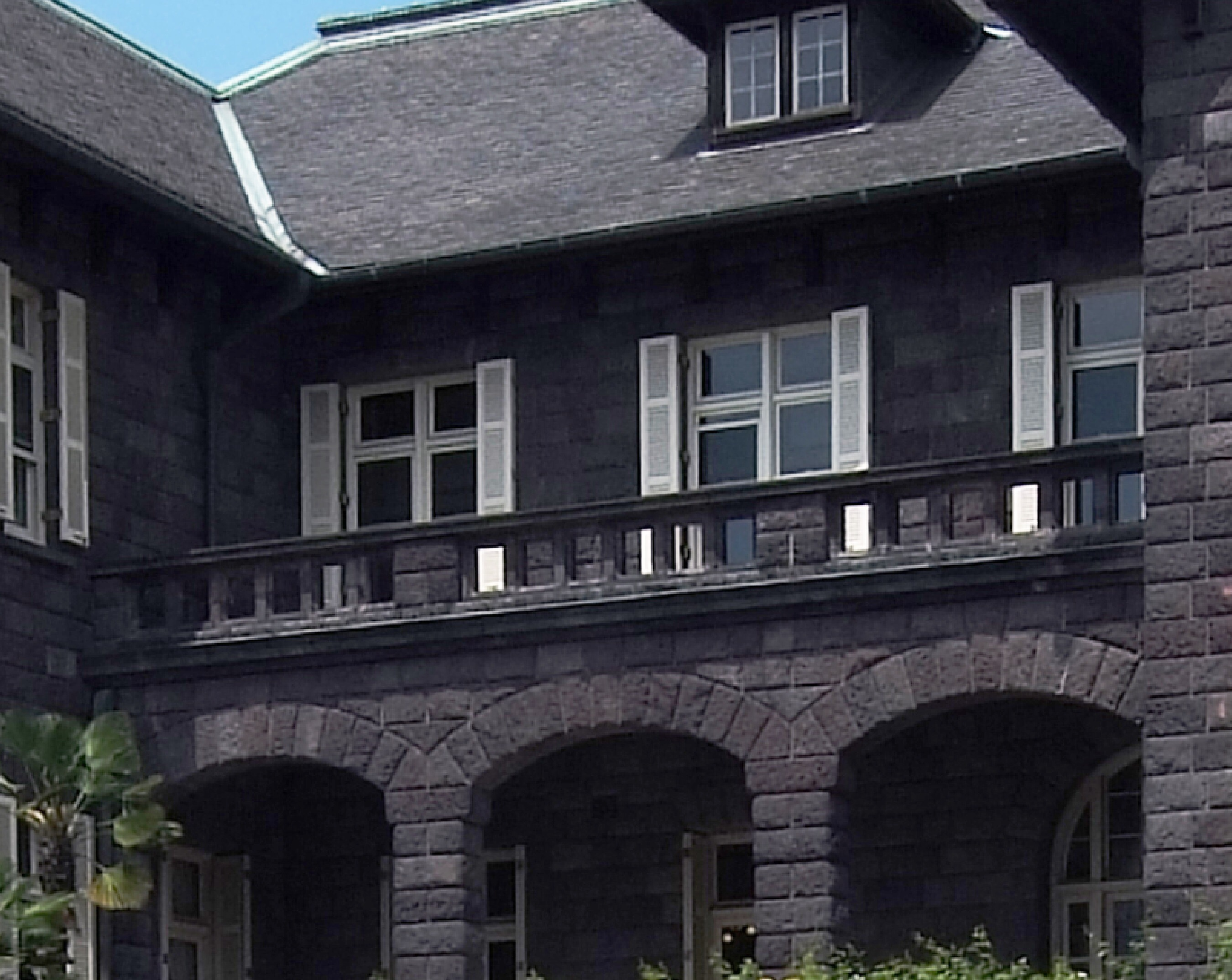 旧古河庭園壁面